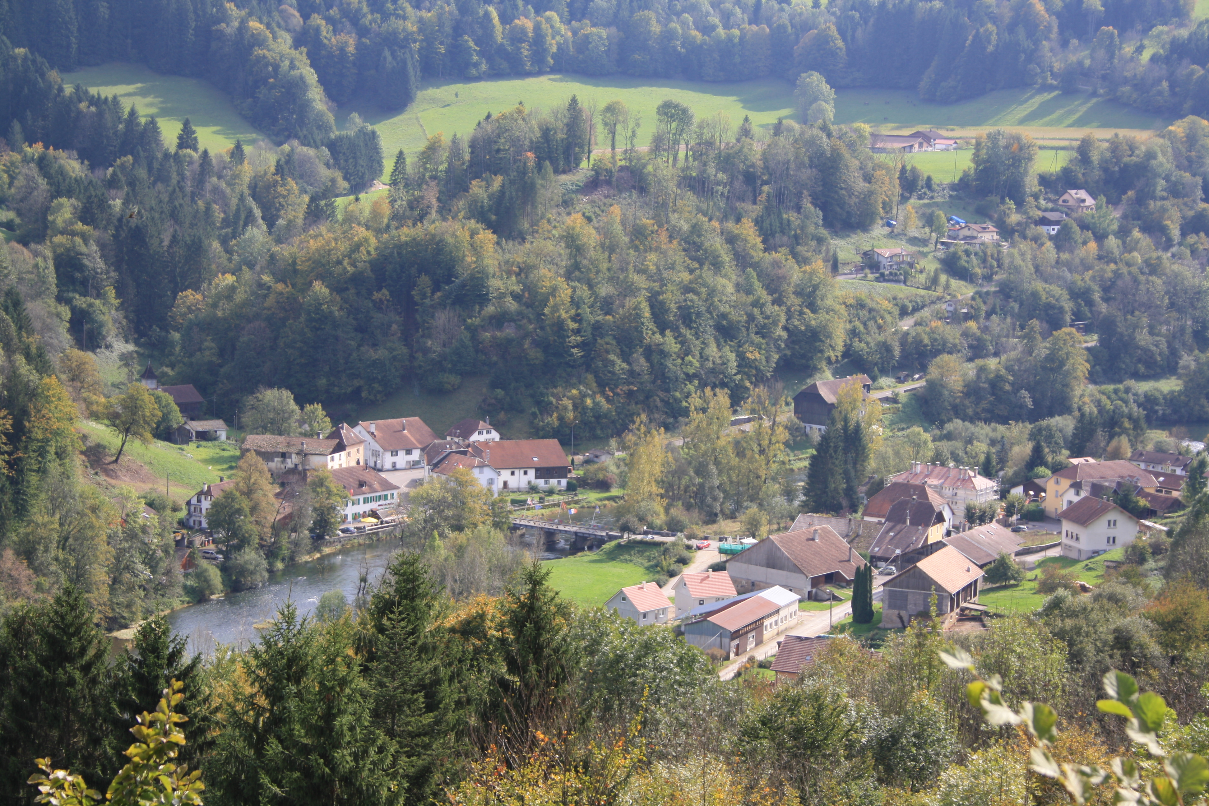 Goumois JU (links) und Goumois (Doubs), dazwischen der Doubs mit der Brücke